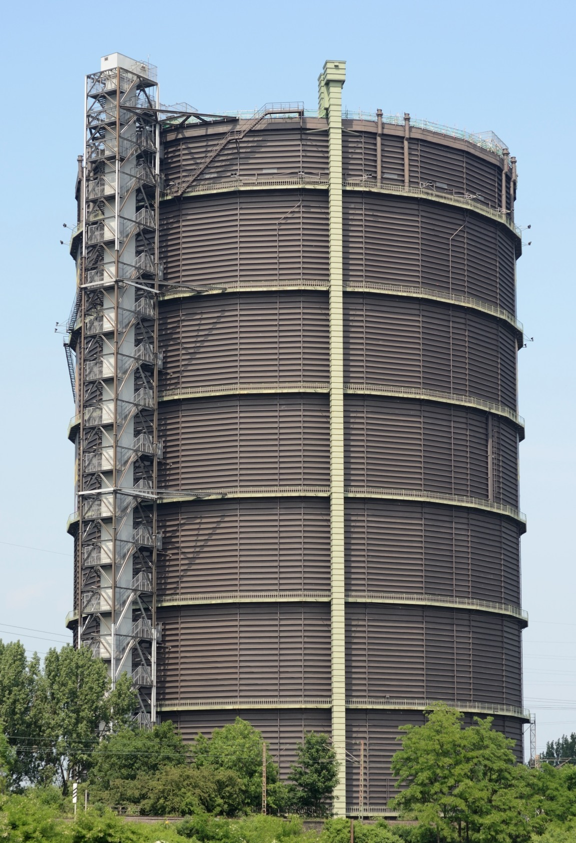 Außenansicht vom Gasometer Oberhausen